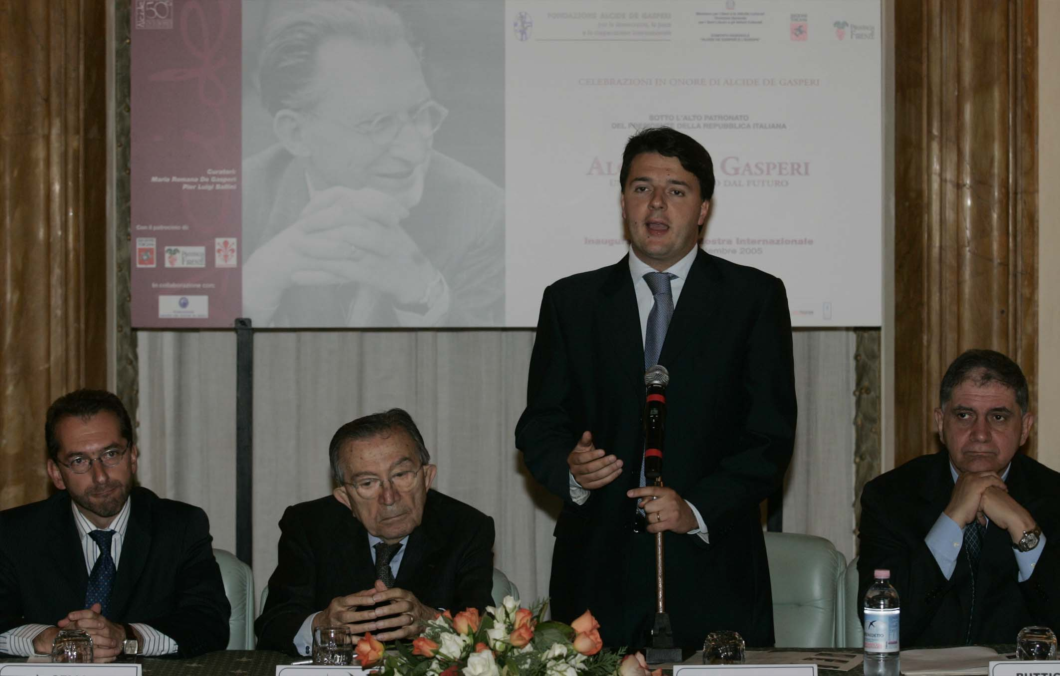 DE GASPERI, APERTA MOSTRA IN PALAZZO MEDICI RICCARDI Cerimonia per l'inaugurazione nella Sala di Luca Giordano.Da sinistra il Vicepresidente della Regione Toscana Federico Gelli, il Senatore Giulio Andreotti, il presidente della Provincia di Firenze Matteo Renzi, il Ministro Rocco Buttiglione